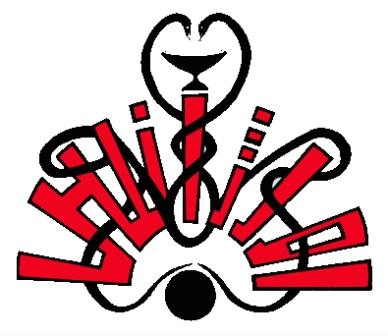 آرم مرکز اطلاعات و اورژانس در بدو تاسیس